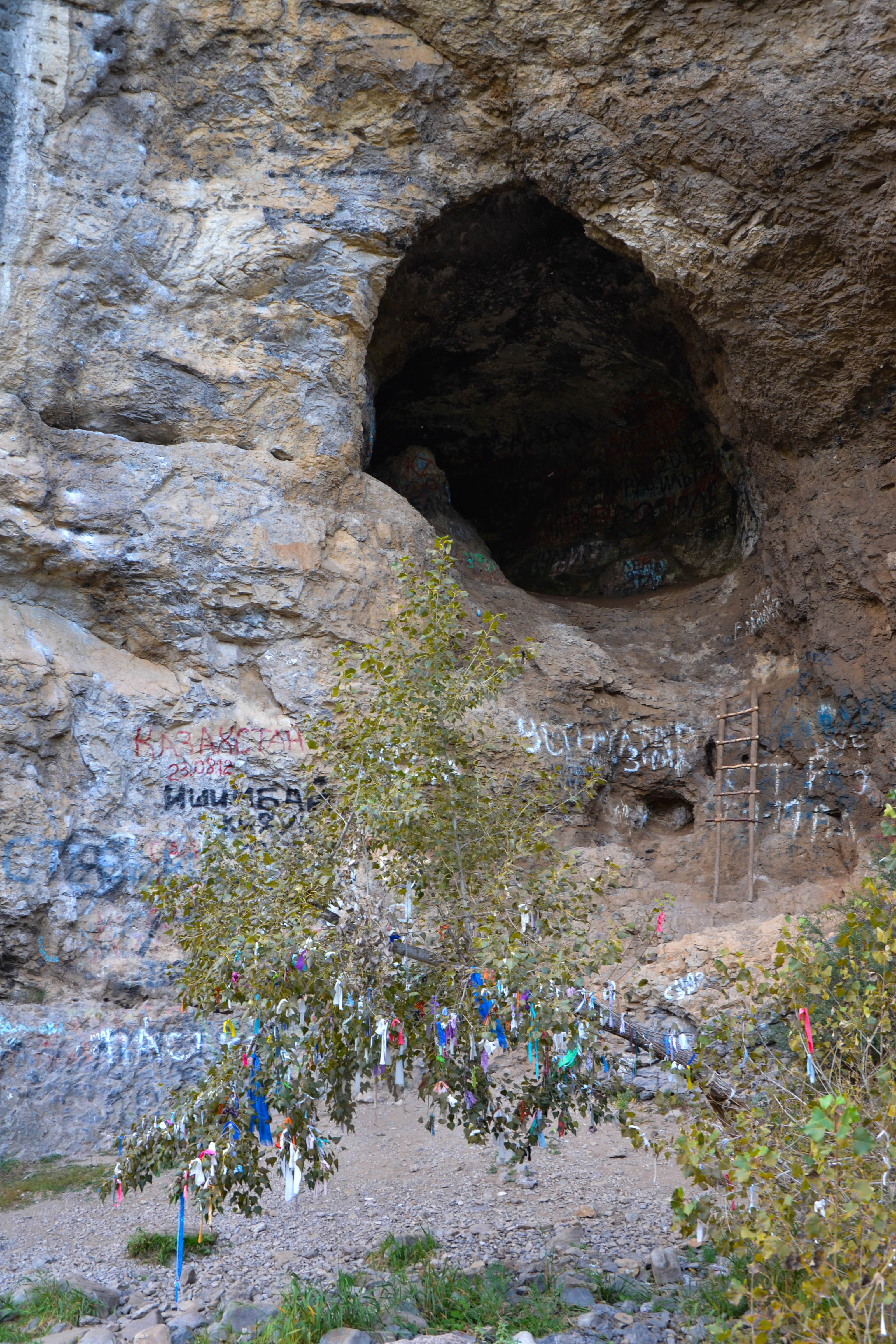 Скала Калим-ускан и пещера Сала-вата Юлаева, Ишимбайский район This image is related to the protected area of Russia number 0210162